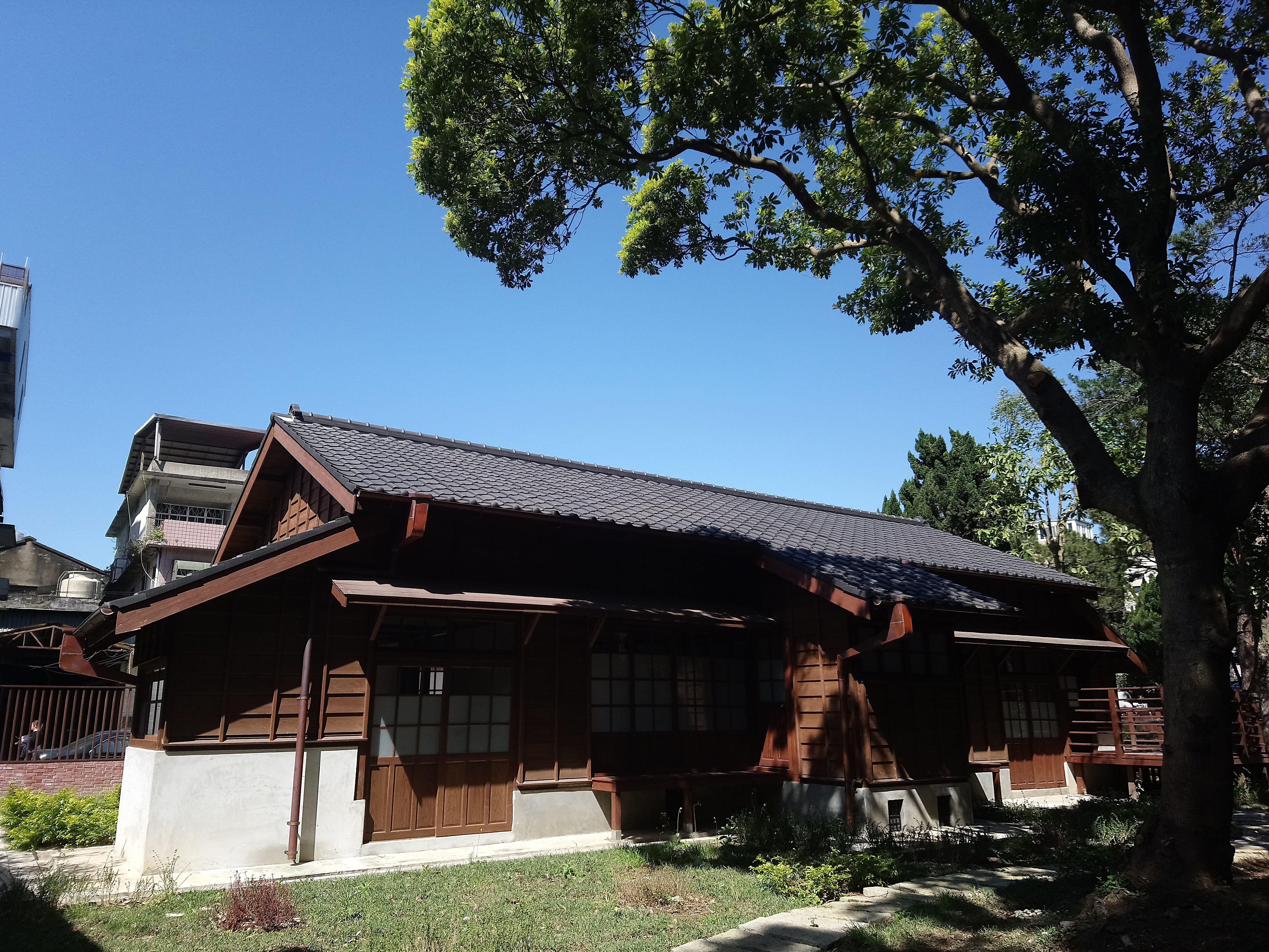 龍潭國小日式宿舍,桃園市龍潭區龍潭里